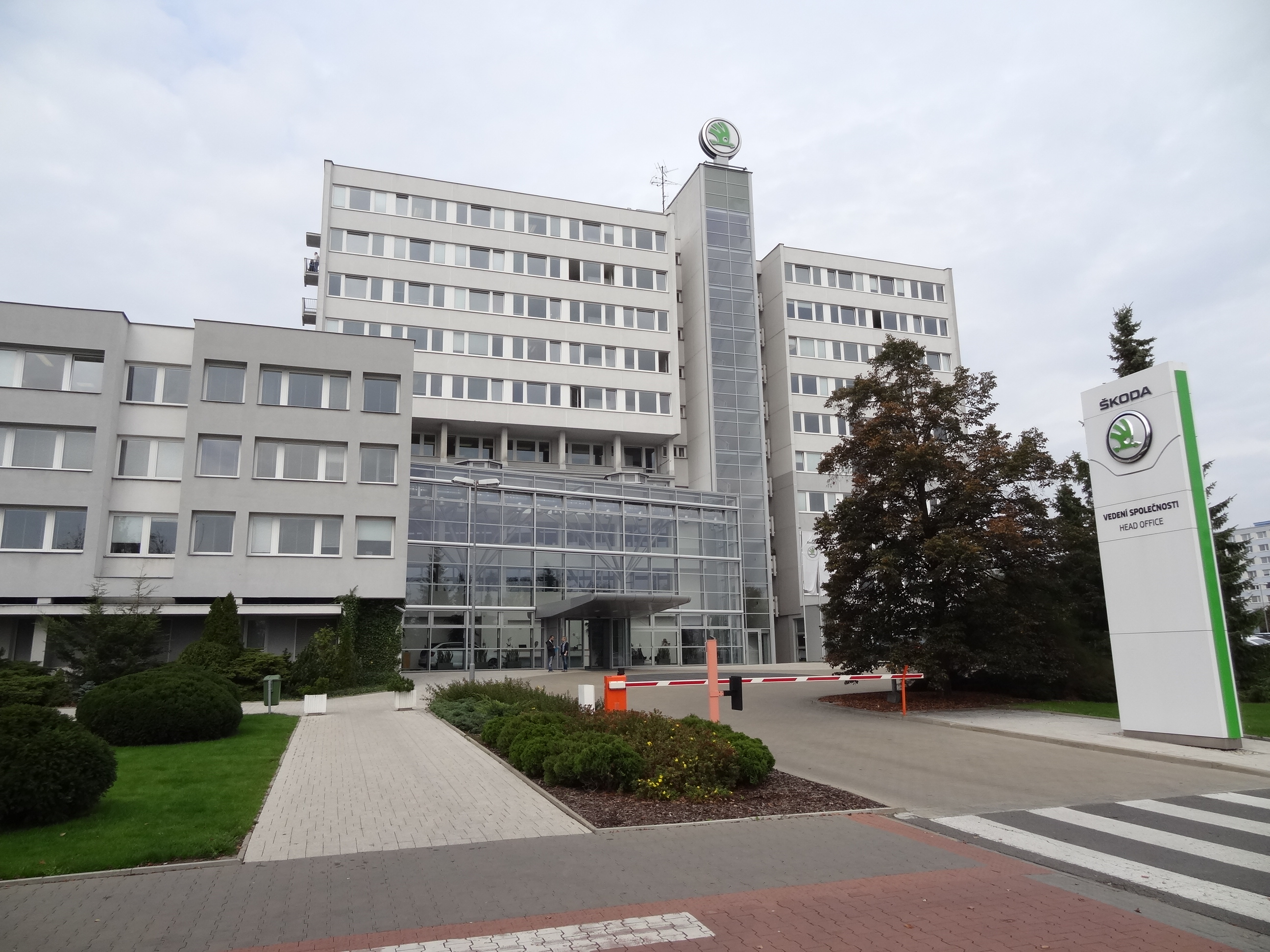 Škoda headquarter